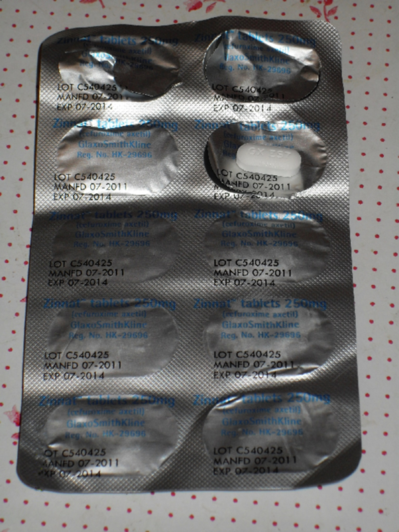 Authentic Zinnat(tm) tablets 250mg from GlaxoSmithKline, contains cefuroxime axetil, prescribed by Tseung Kwan O hospital. bd before or after meals. Antibiotics.